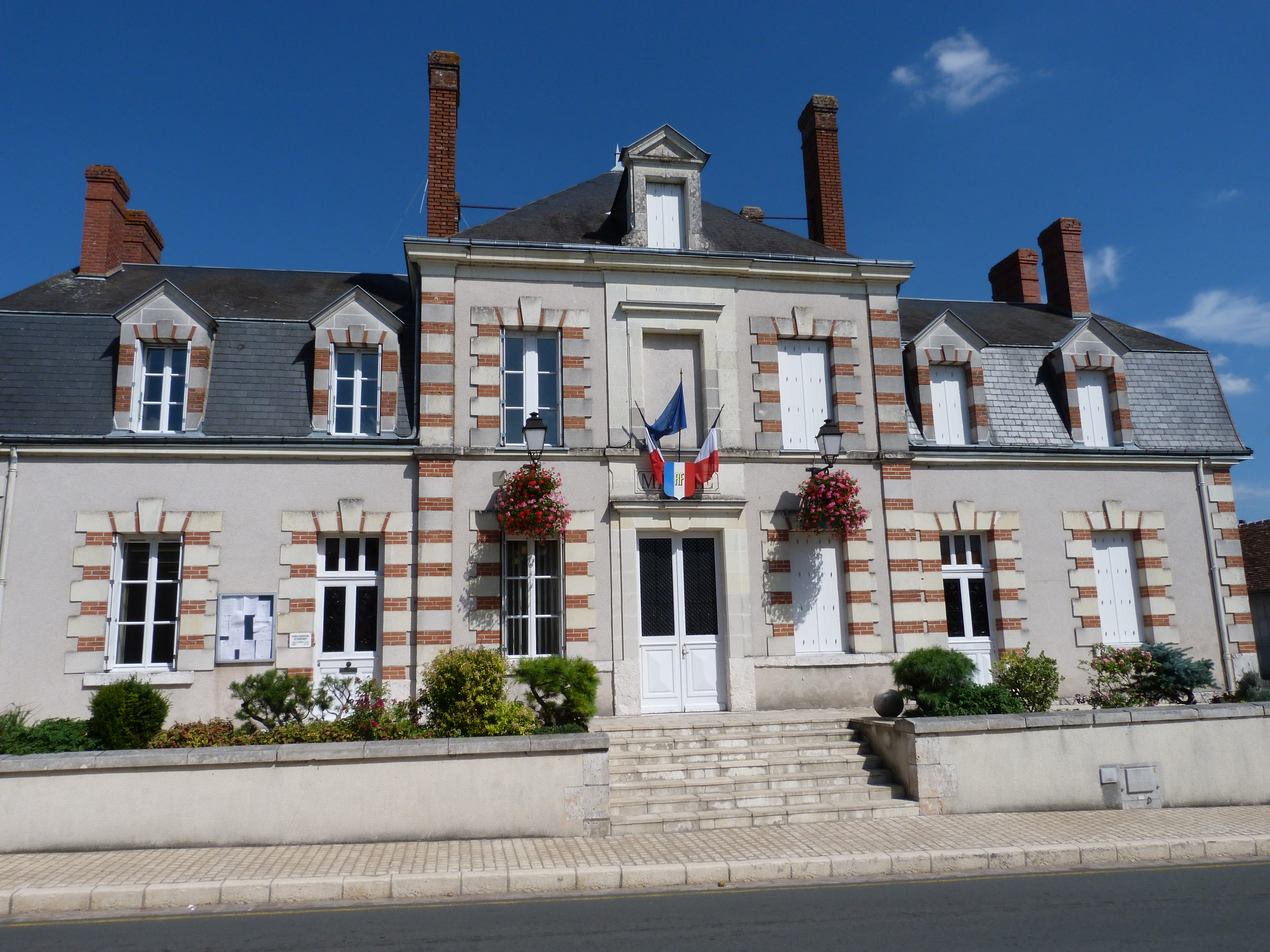 Mairie de Soings-en-Sologne